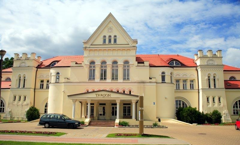 Ciechocinek